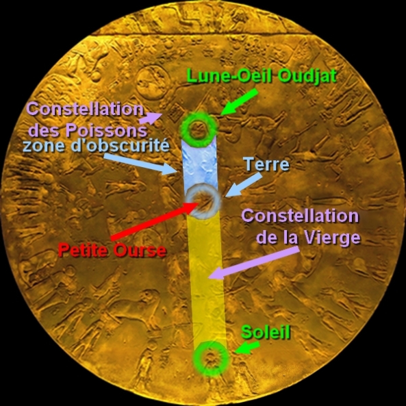 Éclipse lunaire du 25 septembre 52 av. notre ère ( –51 en calendrier astronomique) indiqué sur le Zodiaque de Denderah